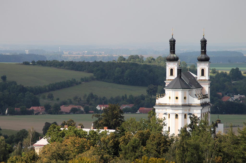 Kostel Panny Marie na Chlumku (Luže), Hamzova, Luže, Luže.